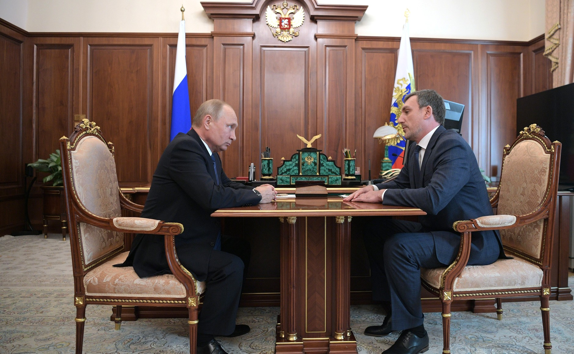 Рабочая встреча с Василием Орловым. Президент подписал Указ о назначении В.Орлова временно исполняющим обязанности губернатора Амурской области (30 мая 2018 года)